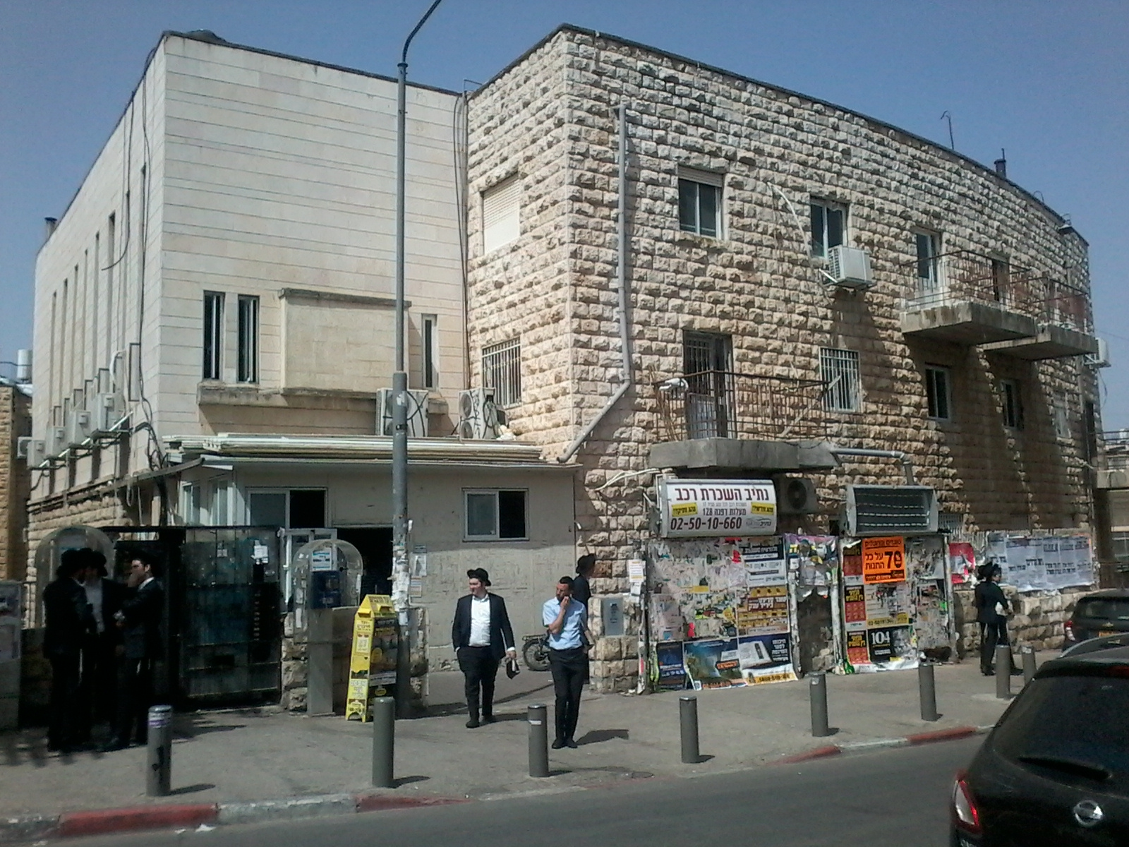 בית המדרש המרכזי ("השטיבלעך") של חסידות אמשינוב בשכונת בית וגן בירושלים